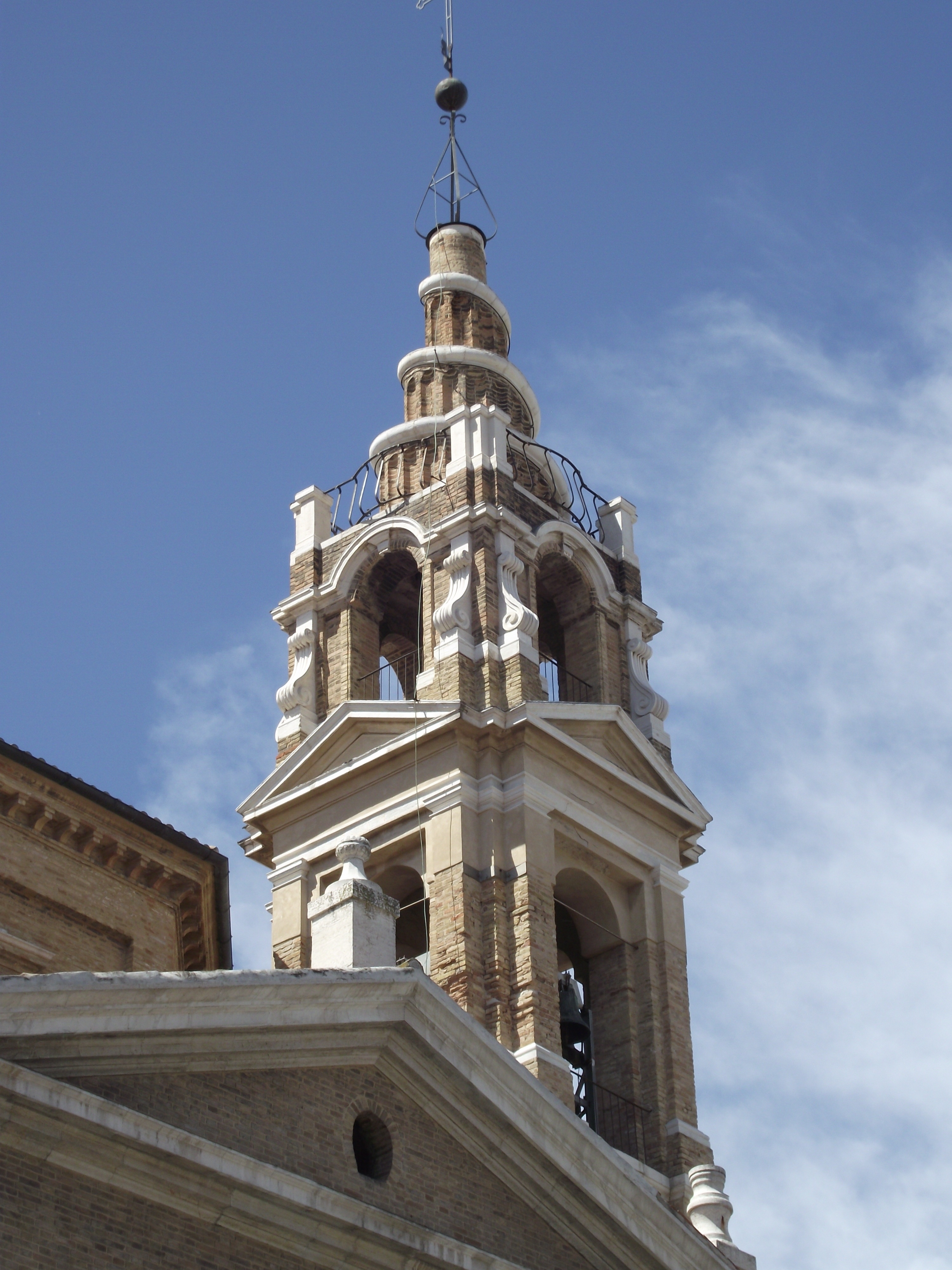 Il caratteristico campanile settecentesco.